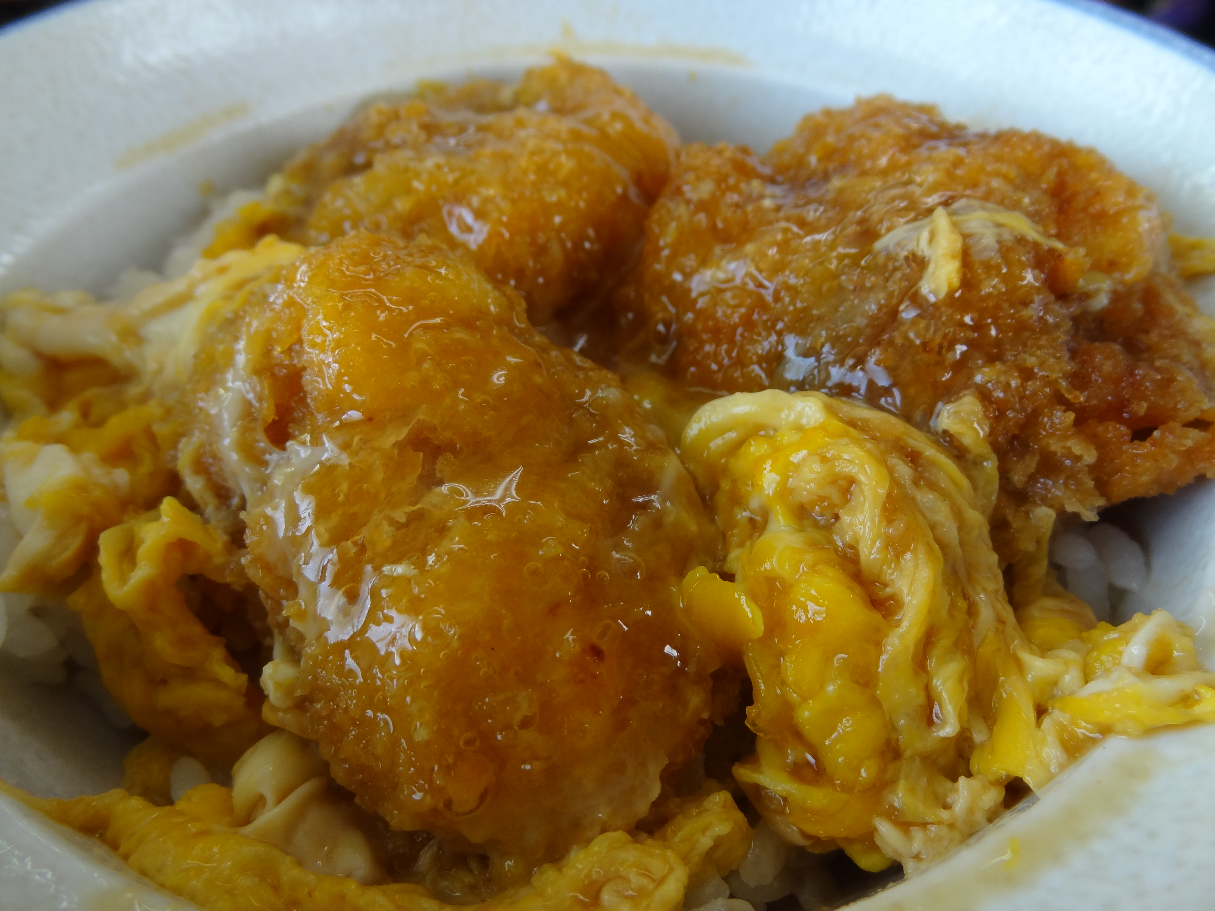 すゞ屋 大あさり丼 (愛知県西尾市 佐久島)